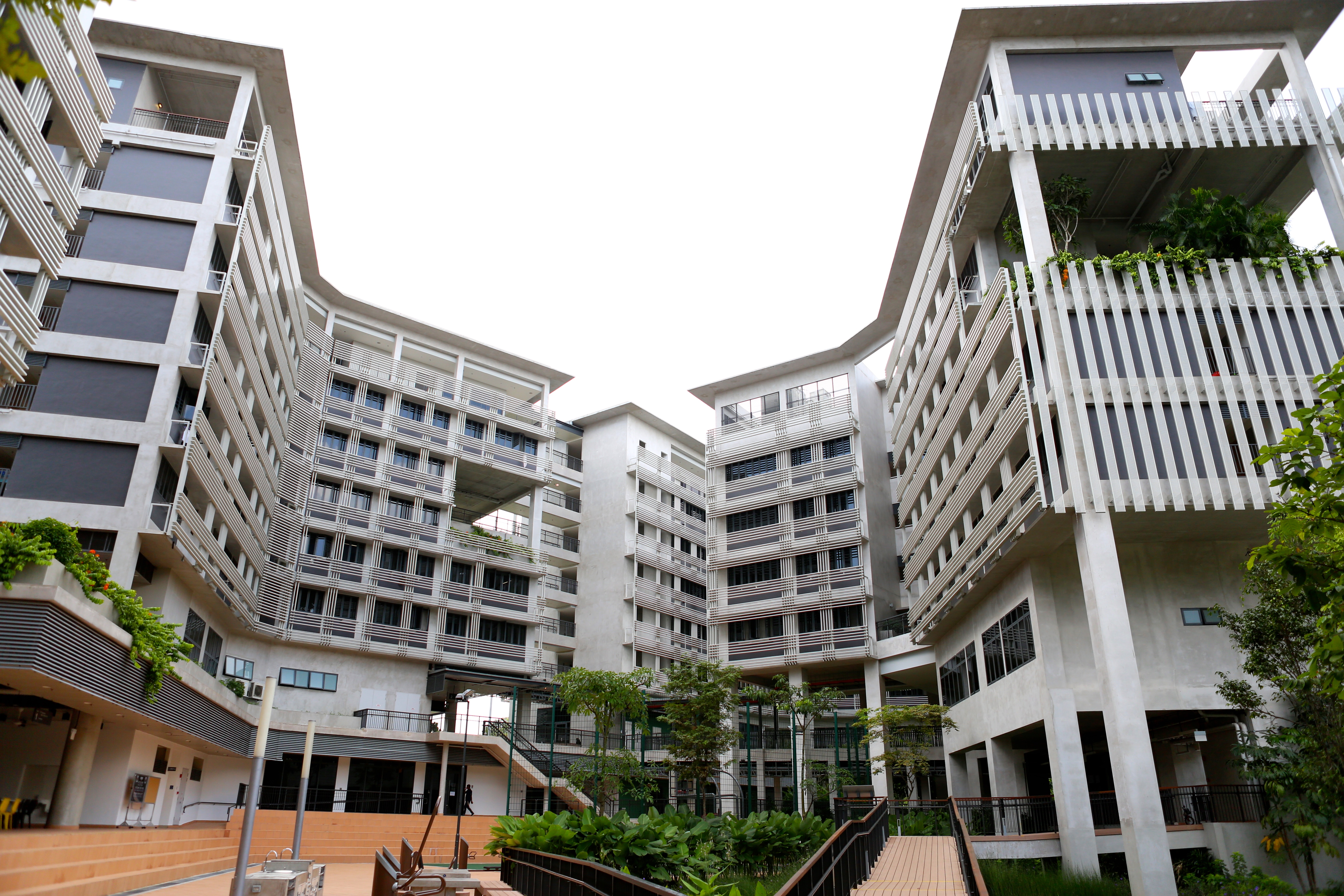 学生棟